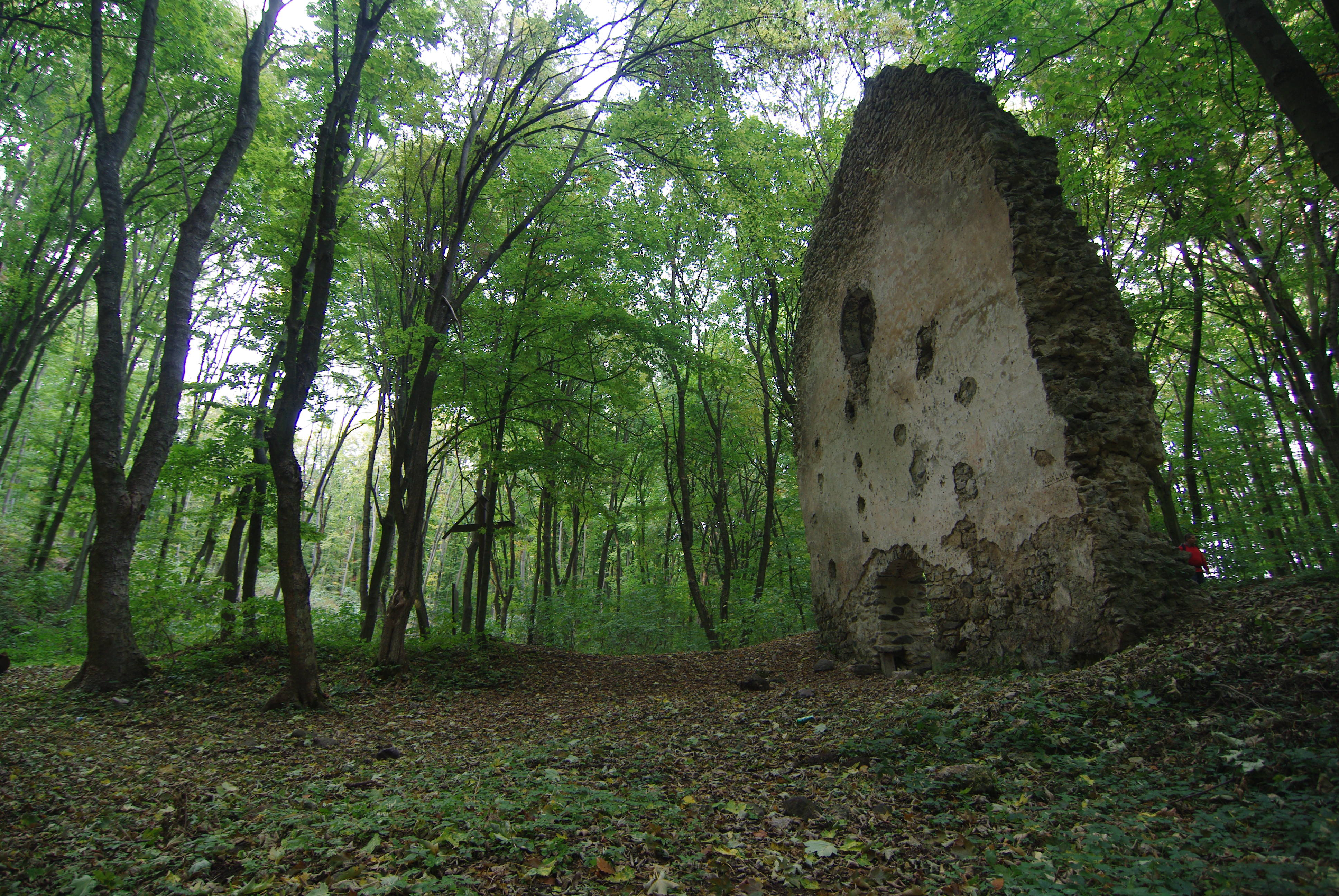 XIV.szd-i Pálos kolostorrom a bakonyi erdőben Pula-Tálod gótikus kolostorrom a Bakonyban. védettség: Műemléki védelem azonosító: 10255 törzsszám: 9930 Bővebben ld.